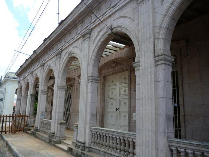 Museo Provincial de Historia en Pinar del Río, Cuba